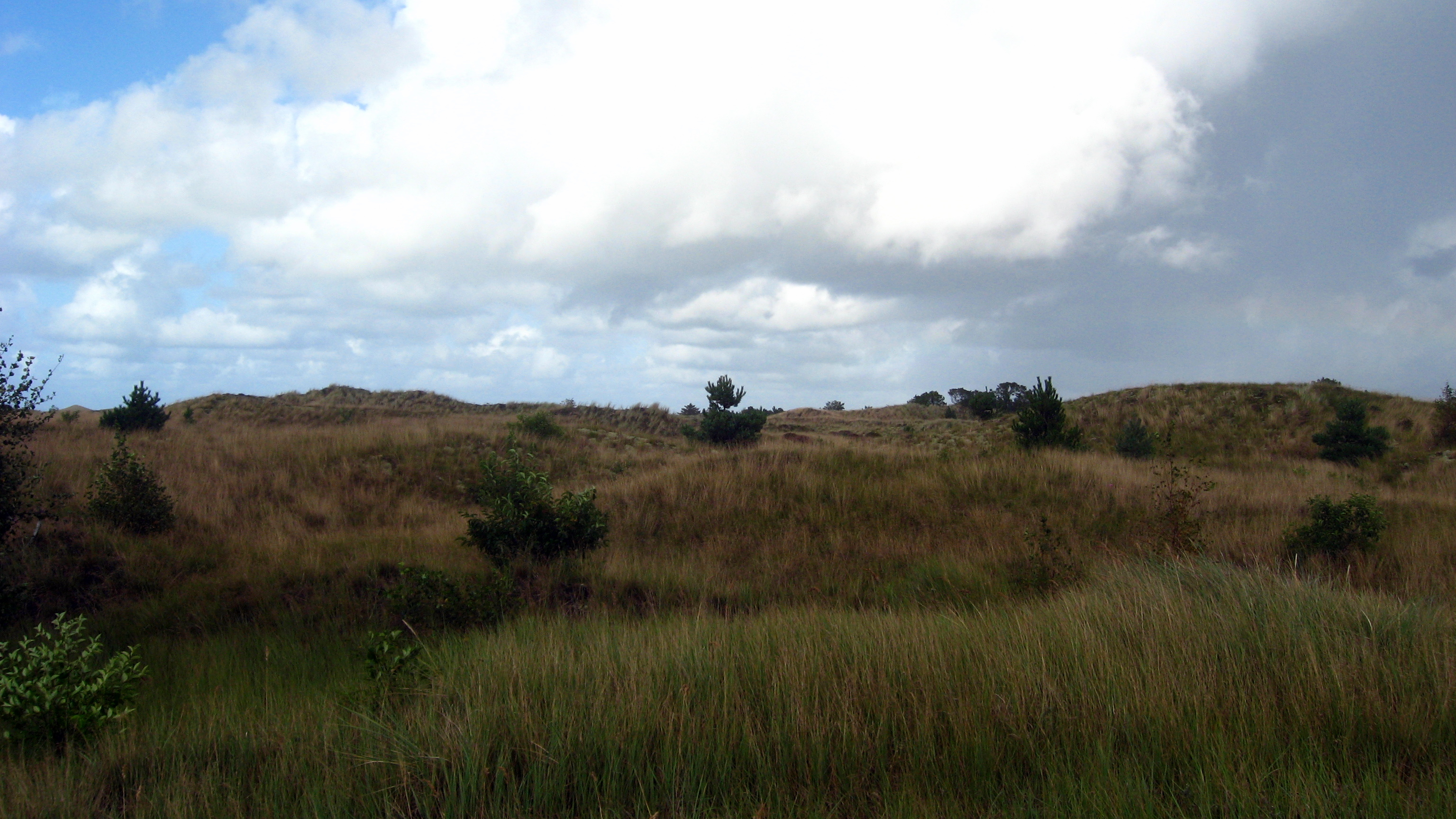 Råbjerg Plantage / Klithede